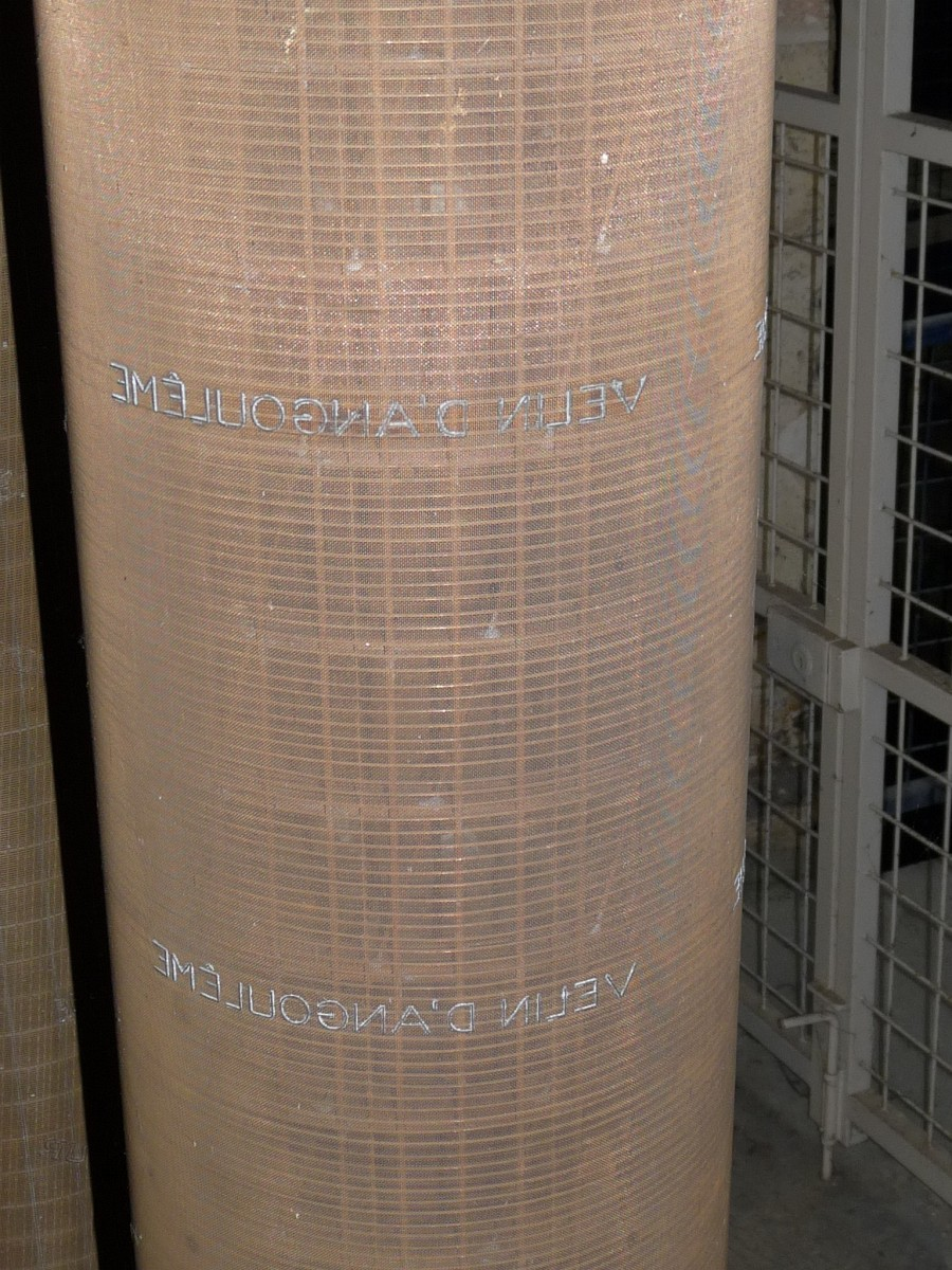 Rouleau à filigrane "Velin d'Angoulême", musée du papier (ancienne usine Le Nil), Angoulême, France